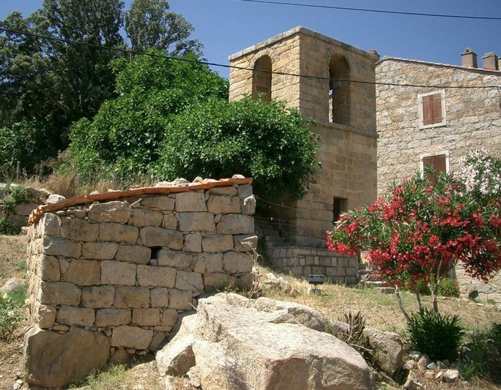 Clocher du village de grossa (Corse - France)